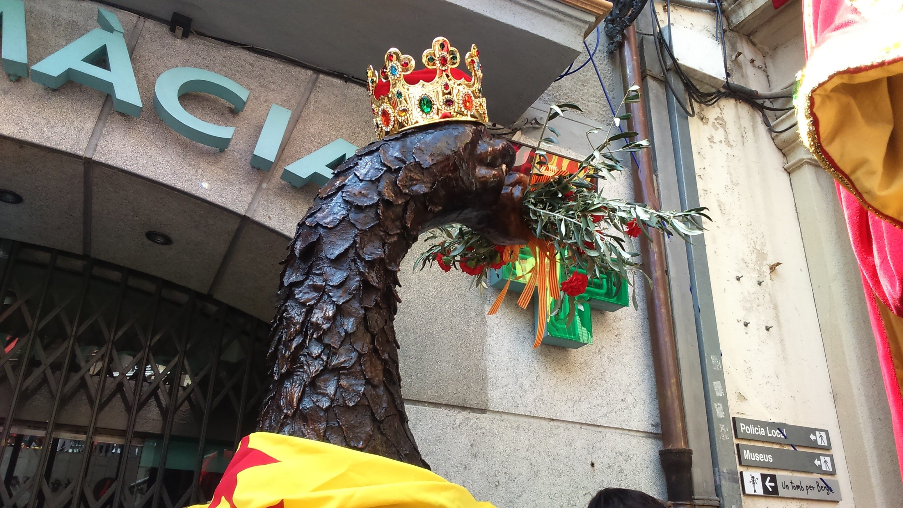 Àguila de la patum de Berga